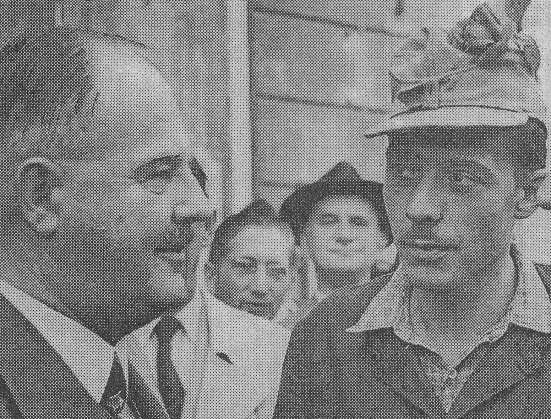 Kurt Seipel (Bild-Mitte) mit Bundeskanzler Julius Raab (links), Wiener Neustadt. Das Original des Fotos befindet sich im Dokumentationsarchiv des österreichischen Widerstandes.